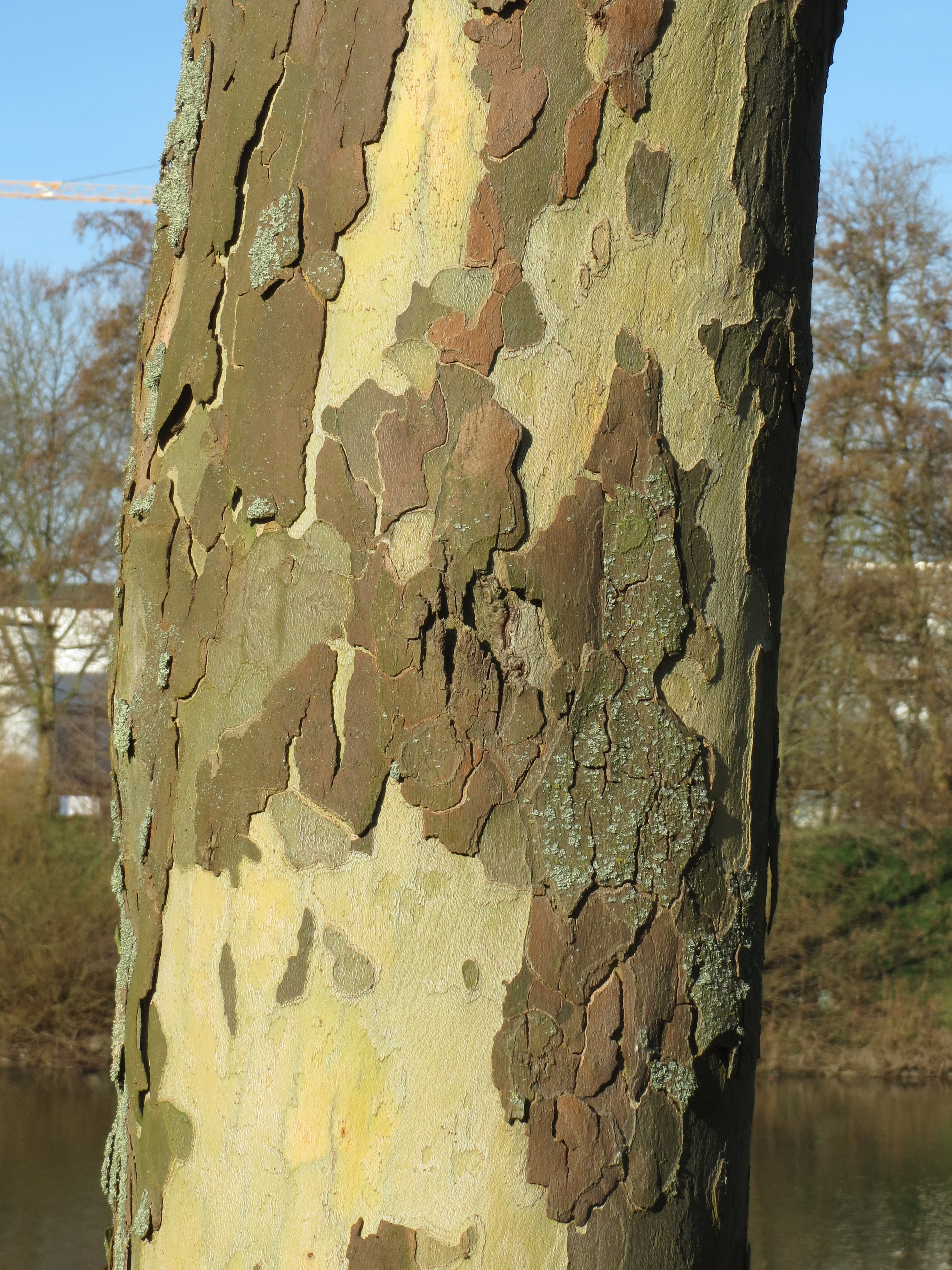 Platane (Platanus × hispanica) an der Saar in Saarbrücken